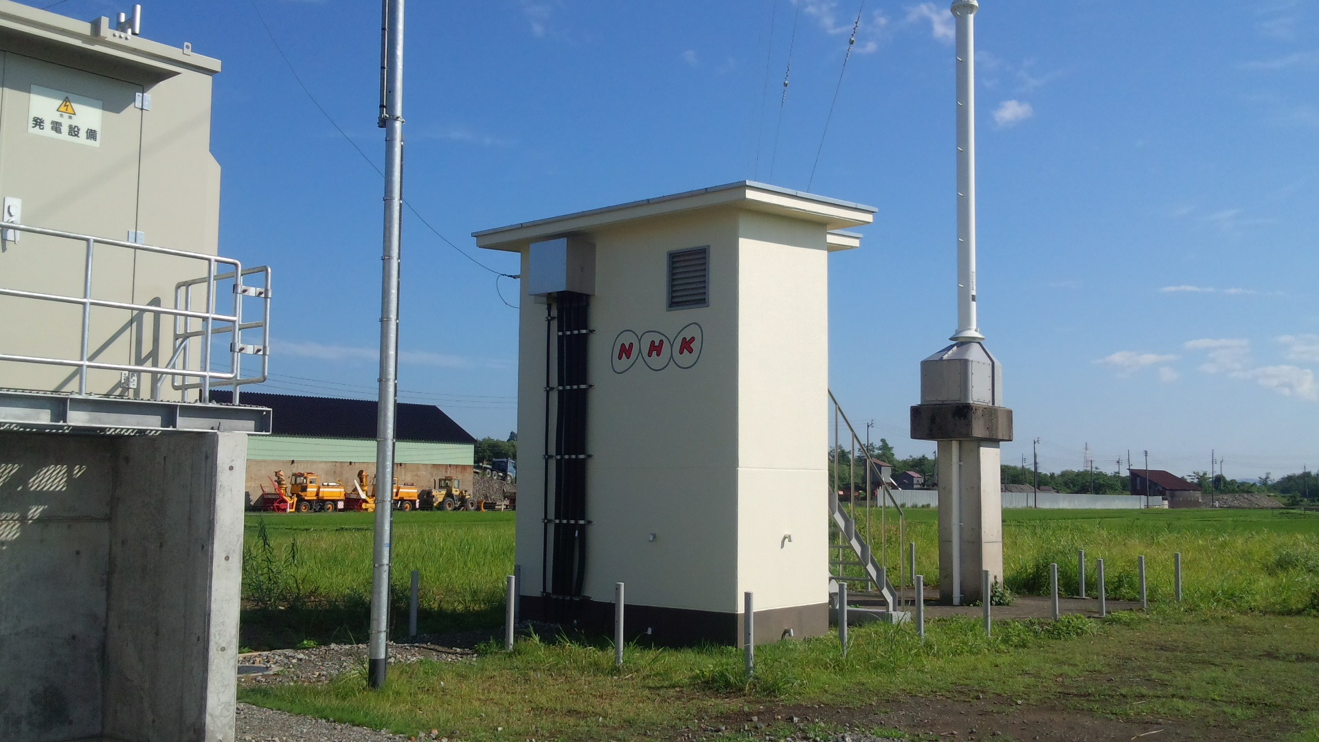 NHK十日町ラジオ中継放送所局舎全景 2015年6月撮影